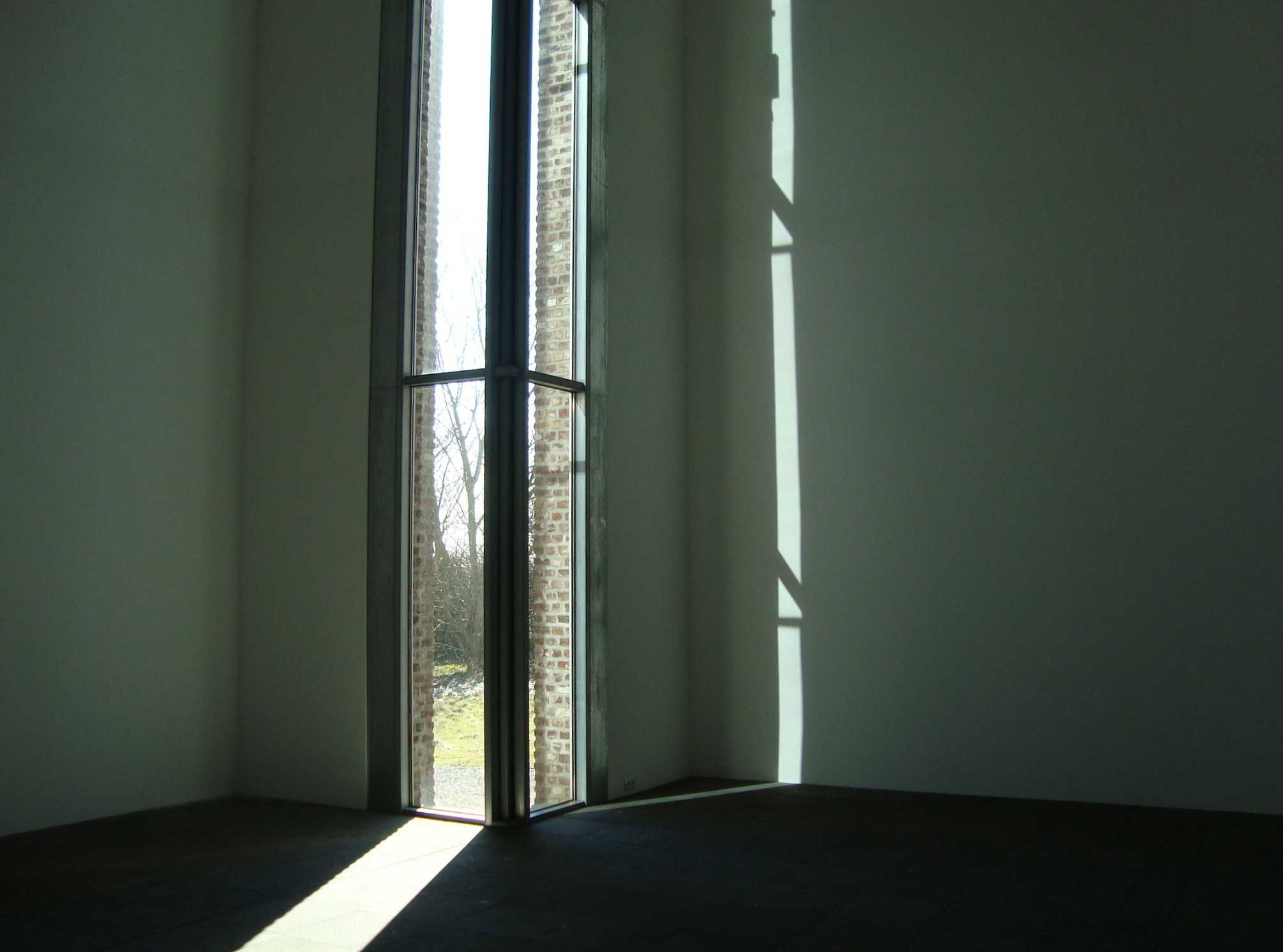 Erwin Heerich, Fontana-Haus, Raketenstation Hombroich